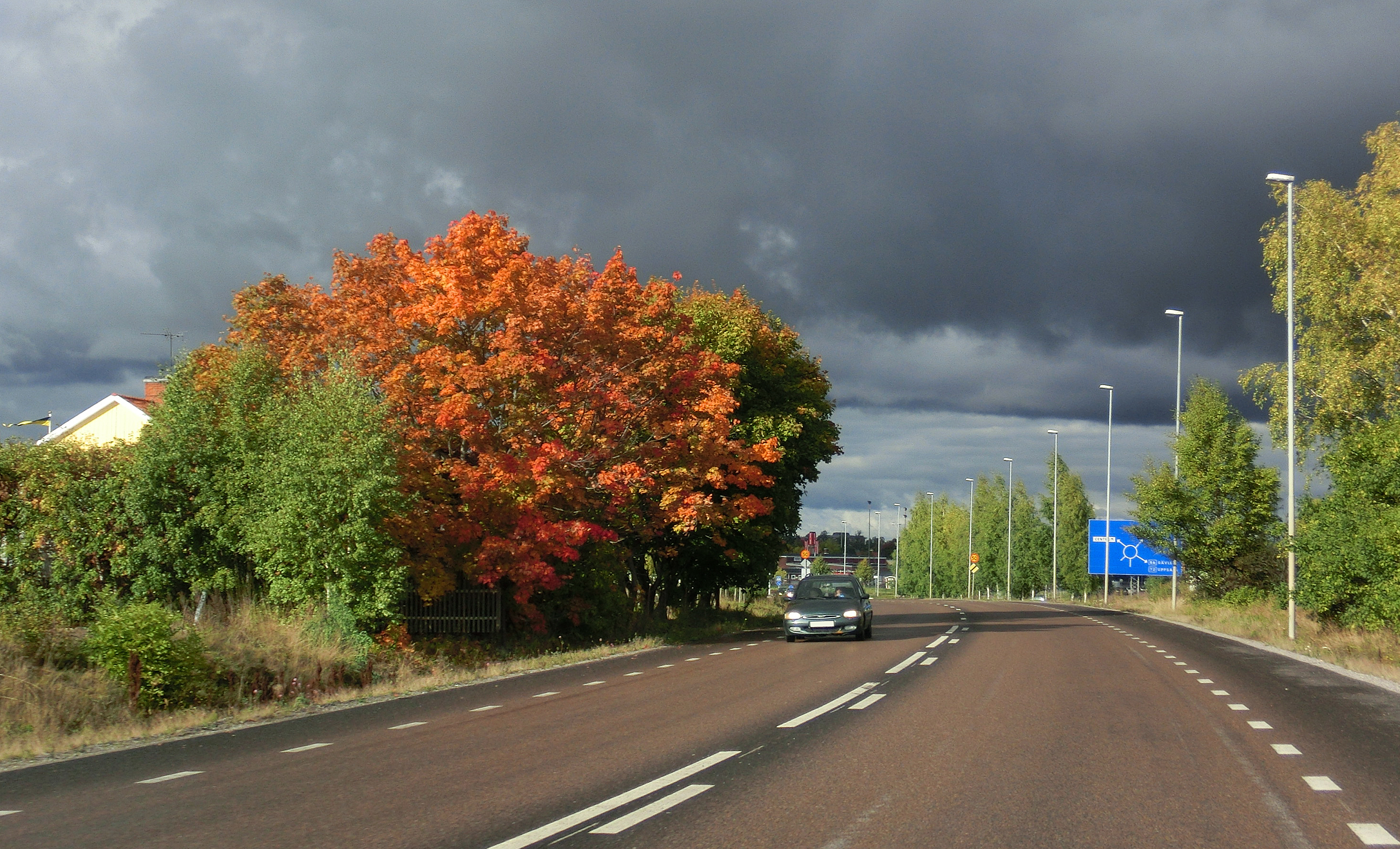 Höstfärgad lönn (Acer sp., troligen A. platanoides) vid Stockholmsvägen (Riksväg 56) i Sala stad, Sala kommun, Västmanlands län, Västmanland, Sverige. Mörka moln på himlen.